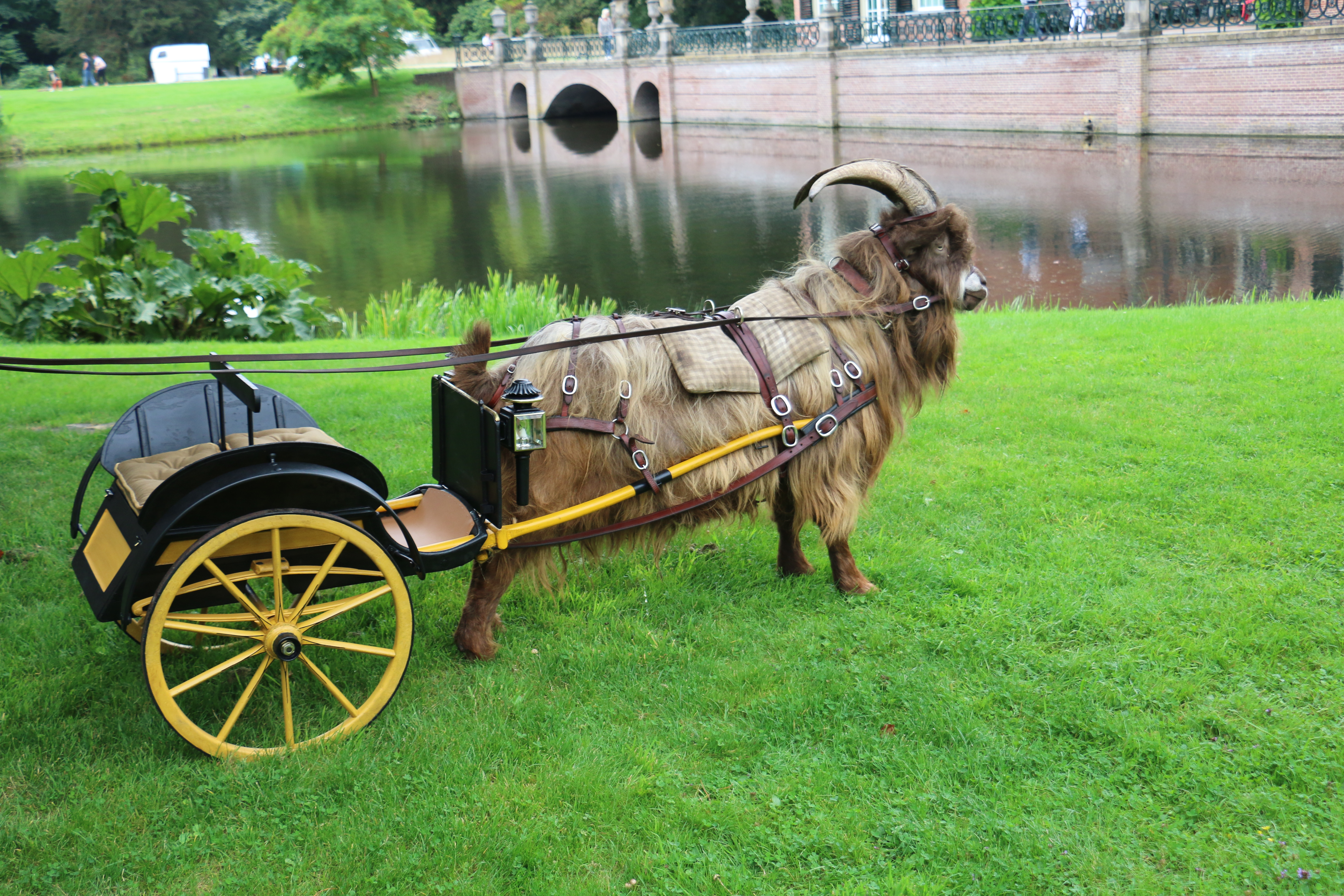 De gerestaureerde bokkenwagen, type Alexandra Cart, achter een bok van het ras Nederlandse Landgeit op de Parkrijtuigendag op kasteel Duivenvoorde in Voorschoten (NL).